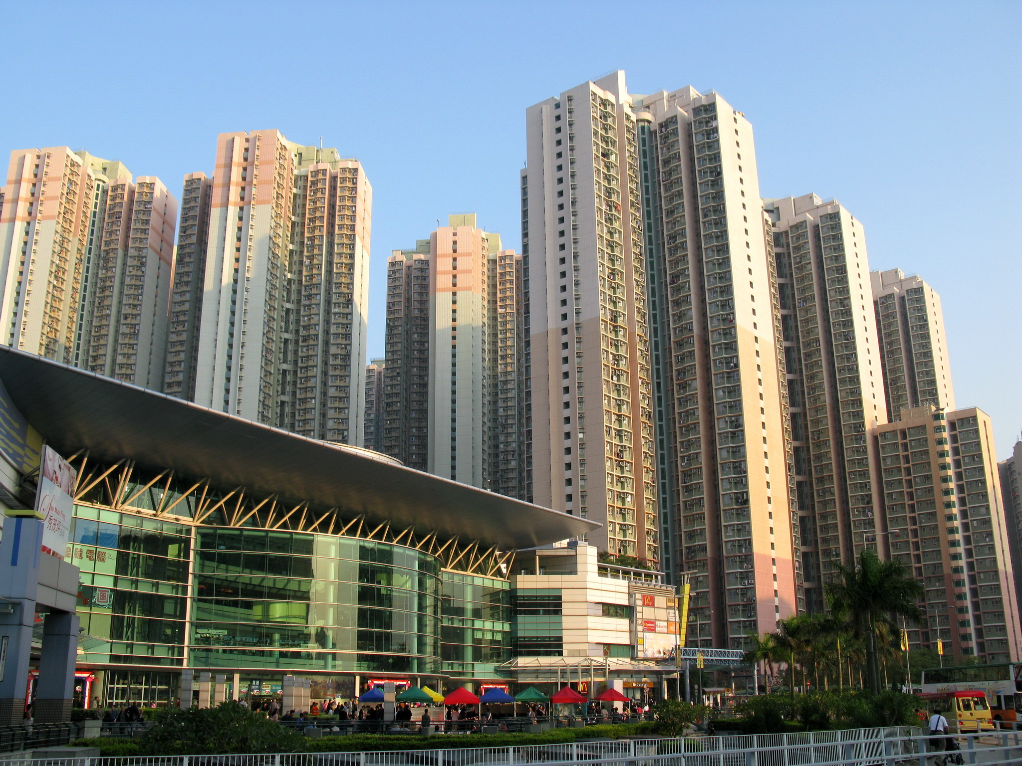 秀茂坪邨及秀茂坪商場 Sau Mau Ping Estate & Sau Mau Ping Shopping Centre